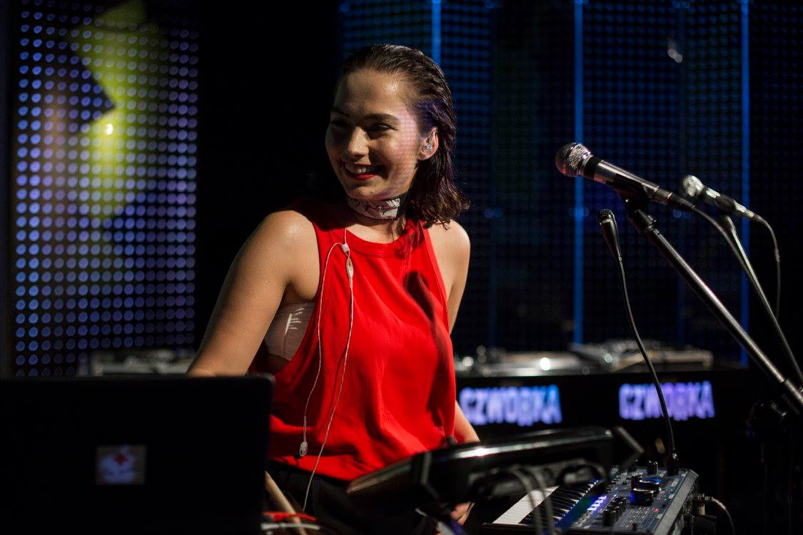 Mery Spolsky podczas koncertu w studiu Czwórki Polskiego Radia z okazji premiery albumu"Miło Było Pana Poznać”.